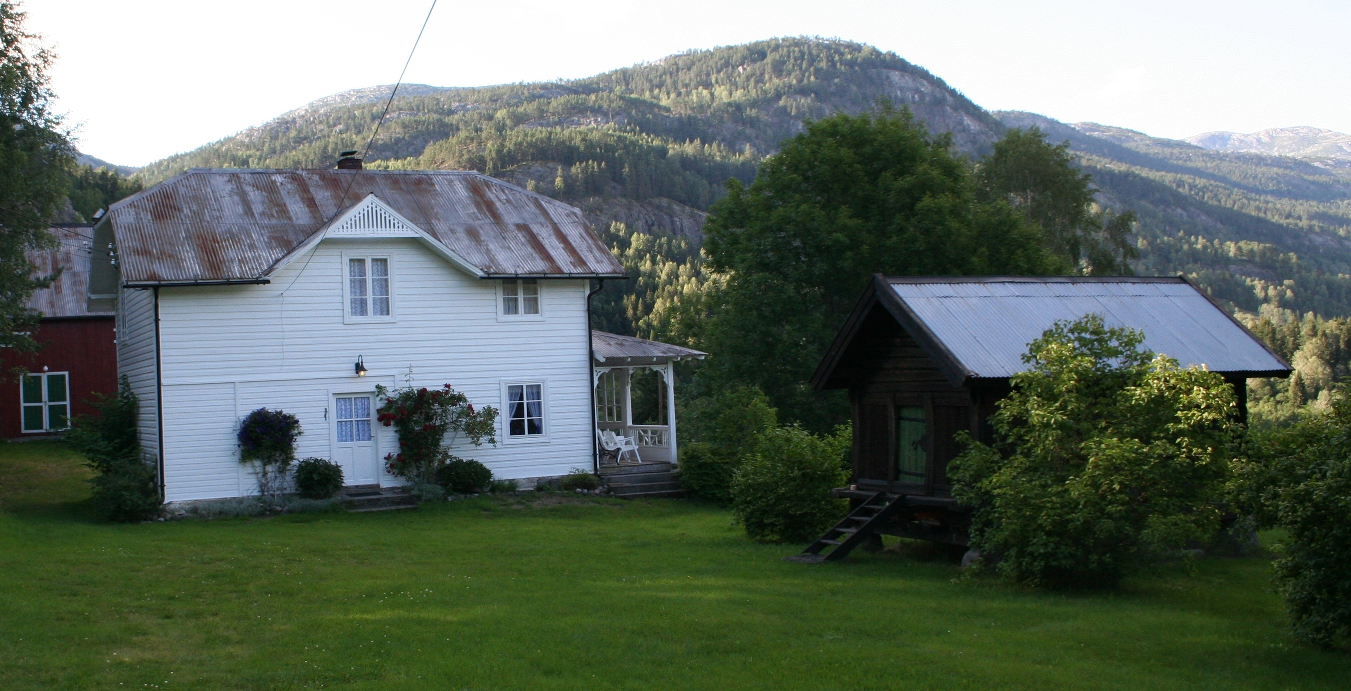 Plassen Ramskeid